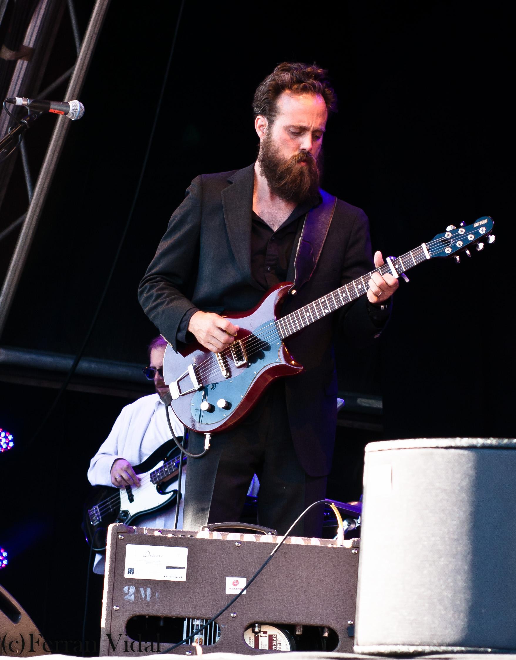 8 de juliol de 2011 Festival Cruïlla Barcelona Parc del Fòrum